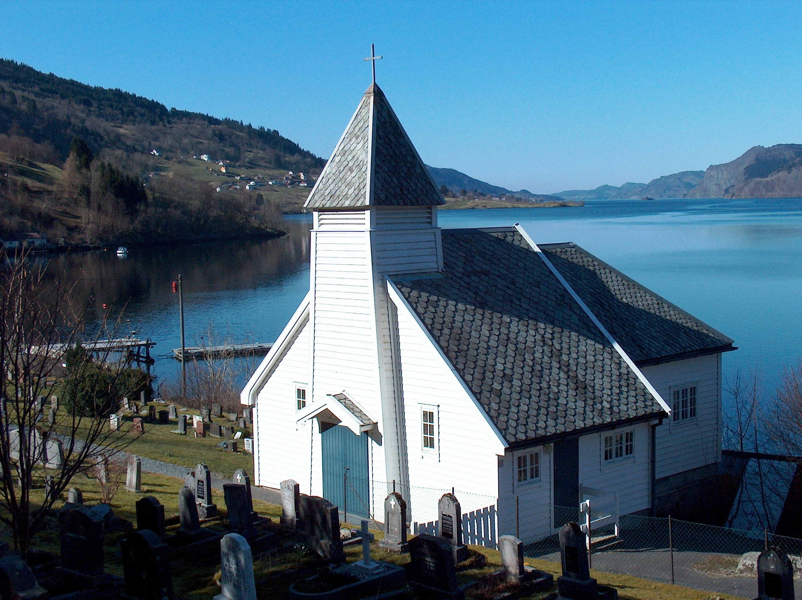 Takvam kapell